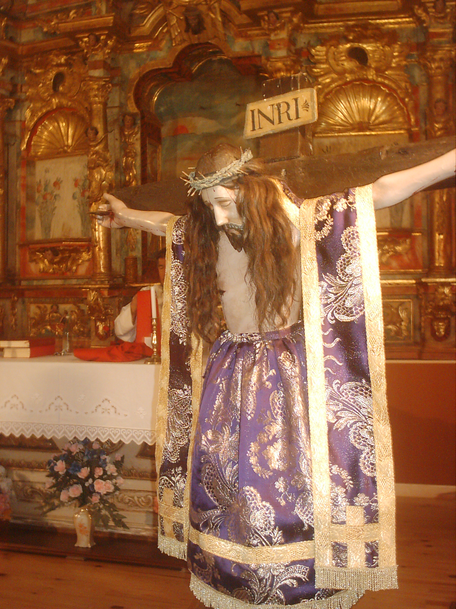 Talla del Bendito Cristo de la Vera Cruz. Imagen venerada en la ermita que lleva su mismo nombre en Morales del Rey